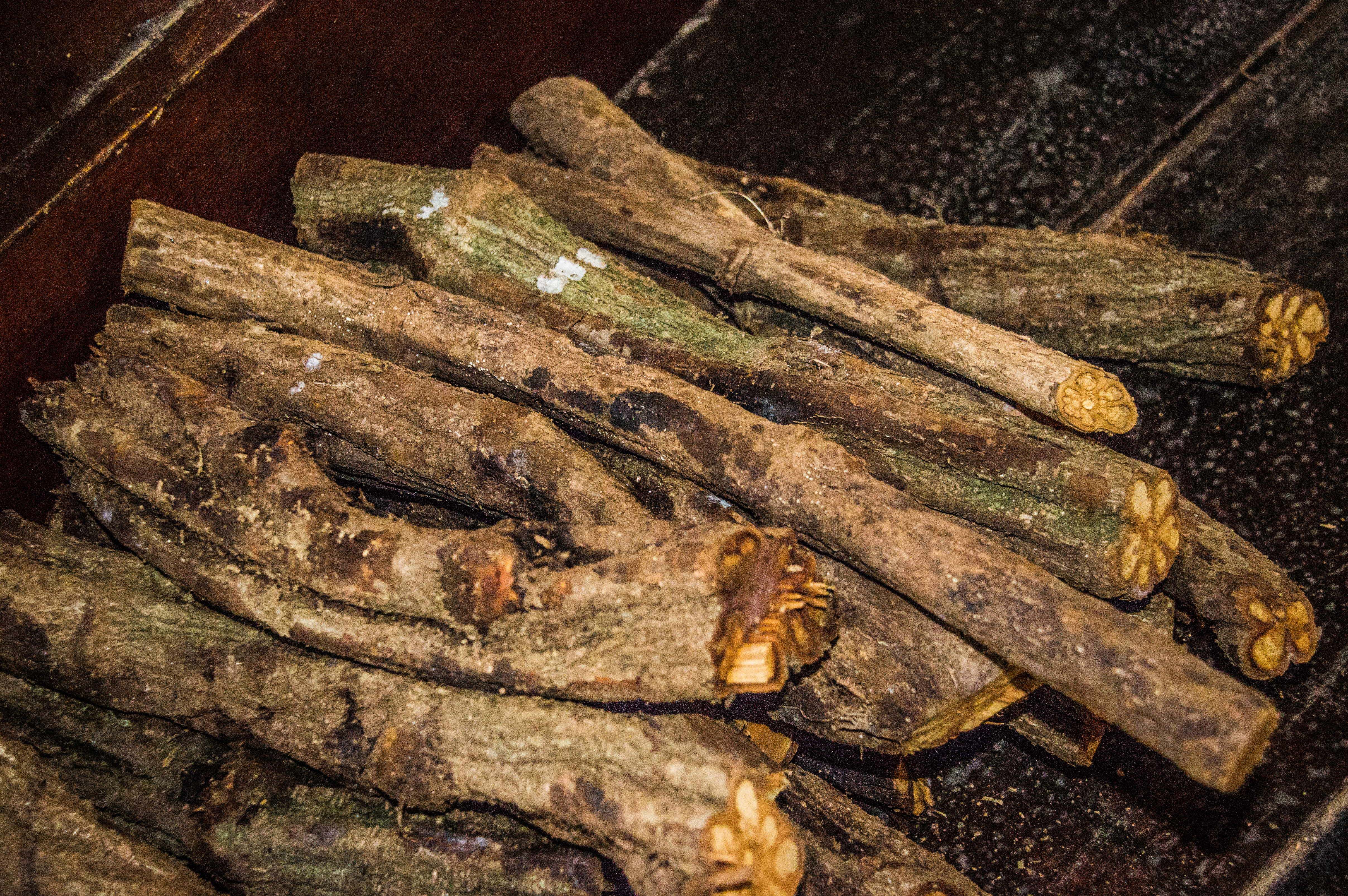 Cortes de Banisteriopsis caapi a utilizarse en la preparación de la decocción ayahuasca.